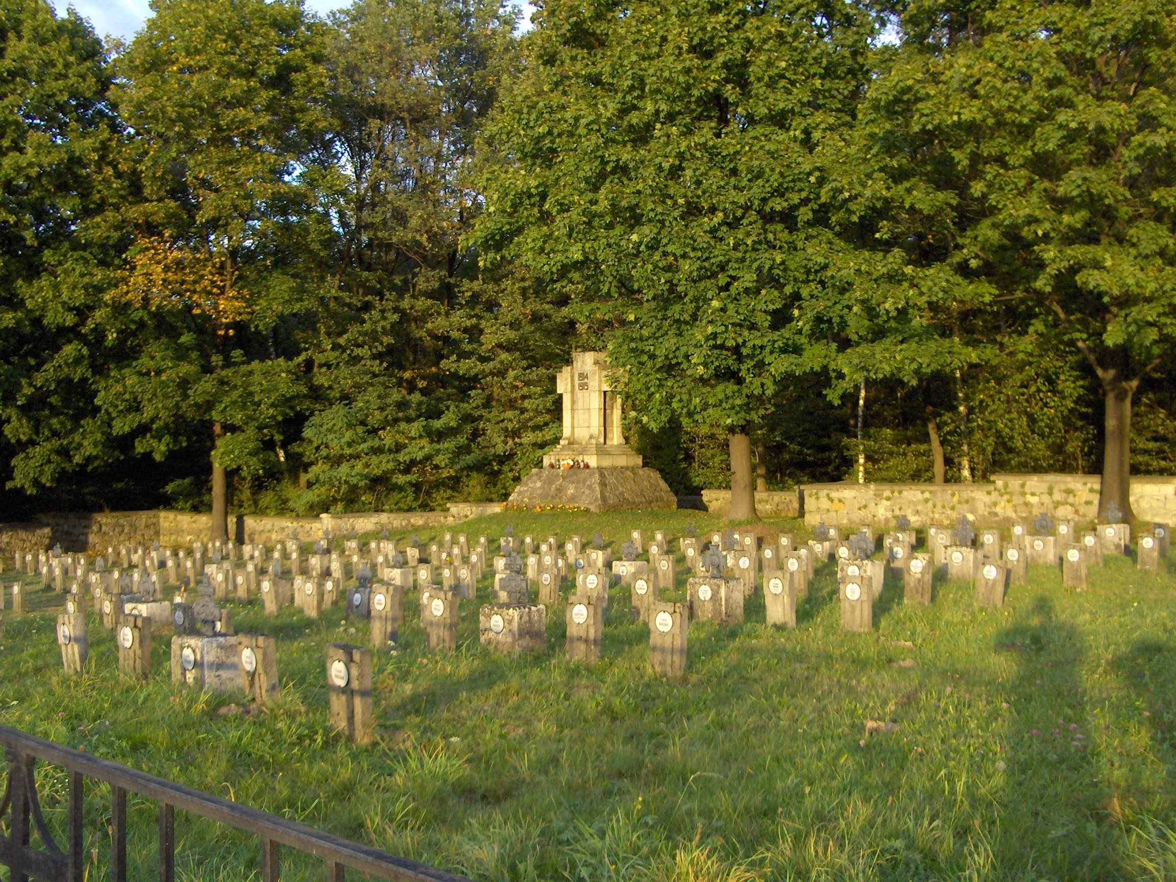 Cmentarz wojenny nr 198 Błonie